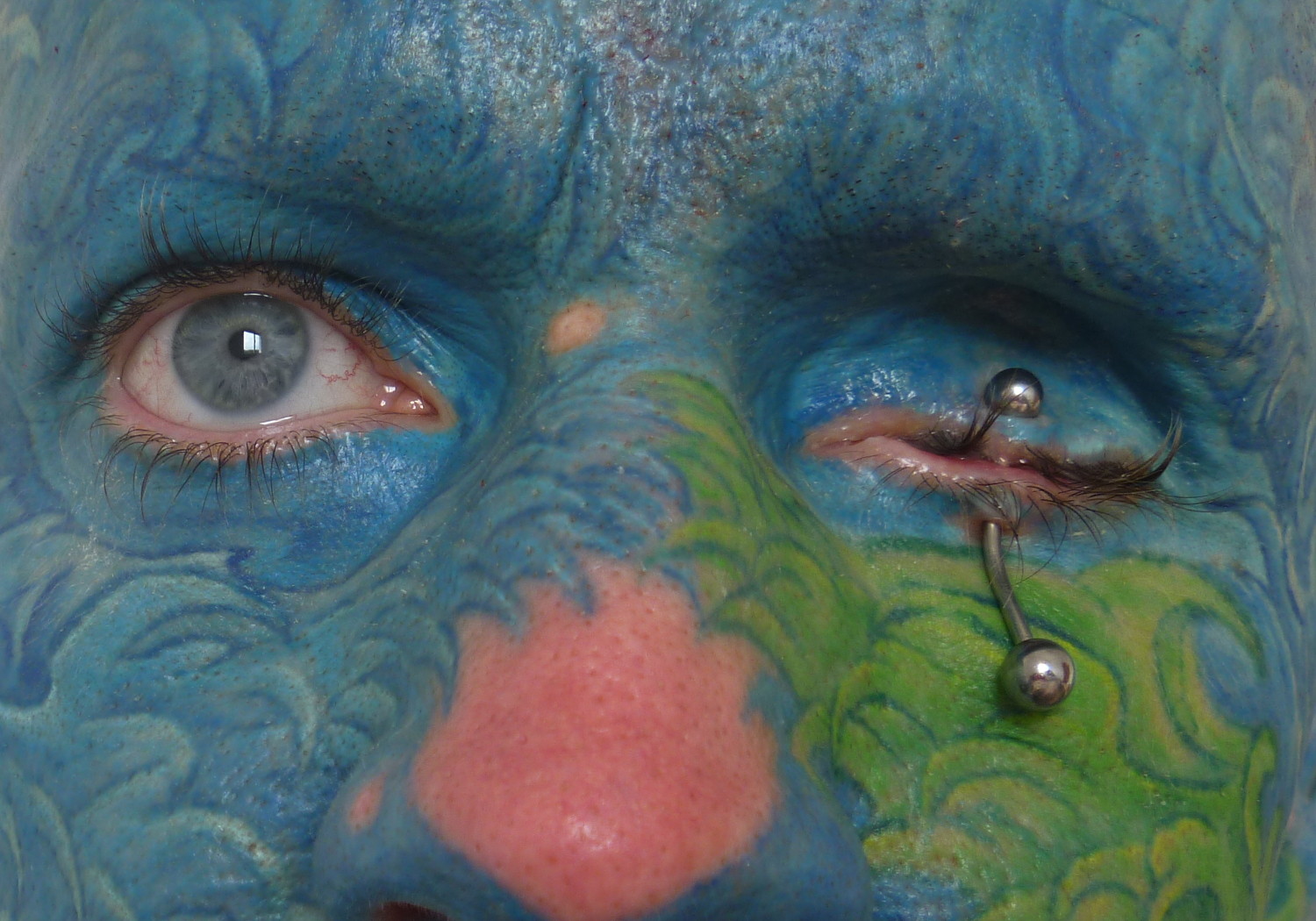 Detalle del rostro tatuado de Juan Carlos Arniz Sanz. En El Puerto de Santa María, España, 2013.